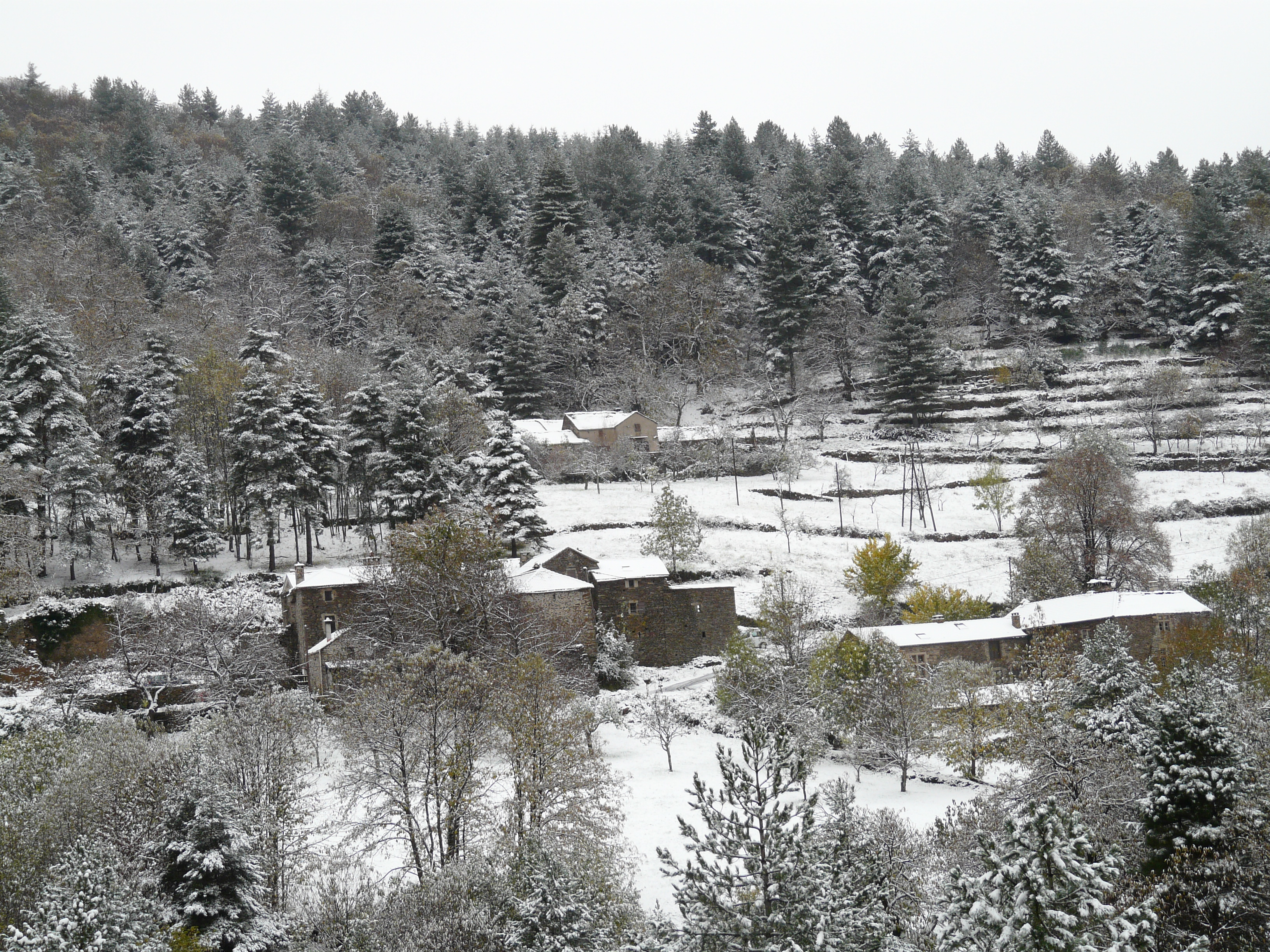 Hameau de Valouze sous la neige.